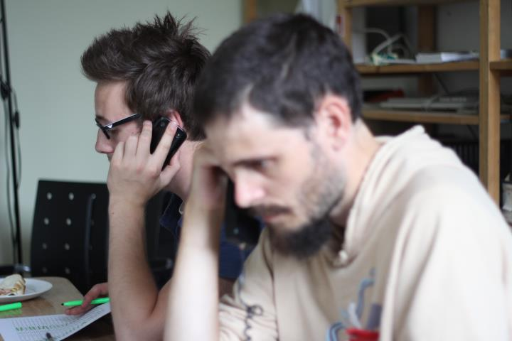 Des étudiants ont milité durant la campagne électorale québécoise de 2012 afin de favoriser la participation électorale des jeunes et aussi pour s'exprimer sur le bilan du gouvernement libéral. La Fédération étudiante universitaire du Québec avait organisé des centrales téléphoniques durant les élections pour entrer en contact avec les étudiants.